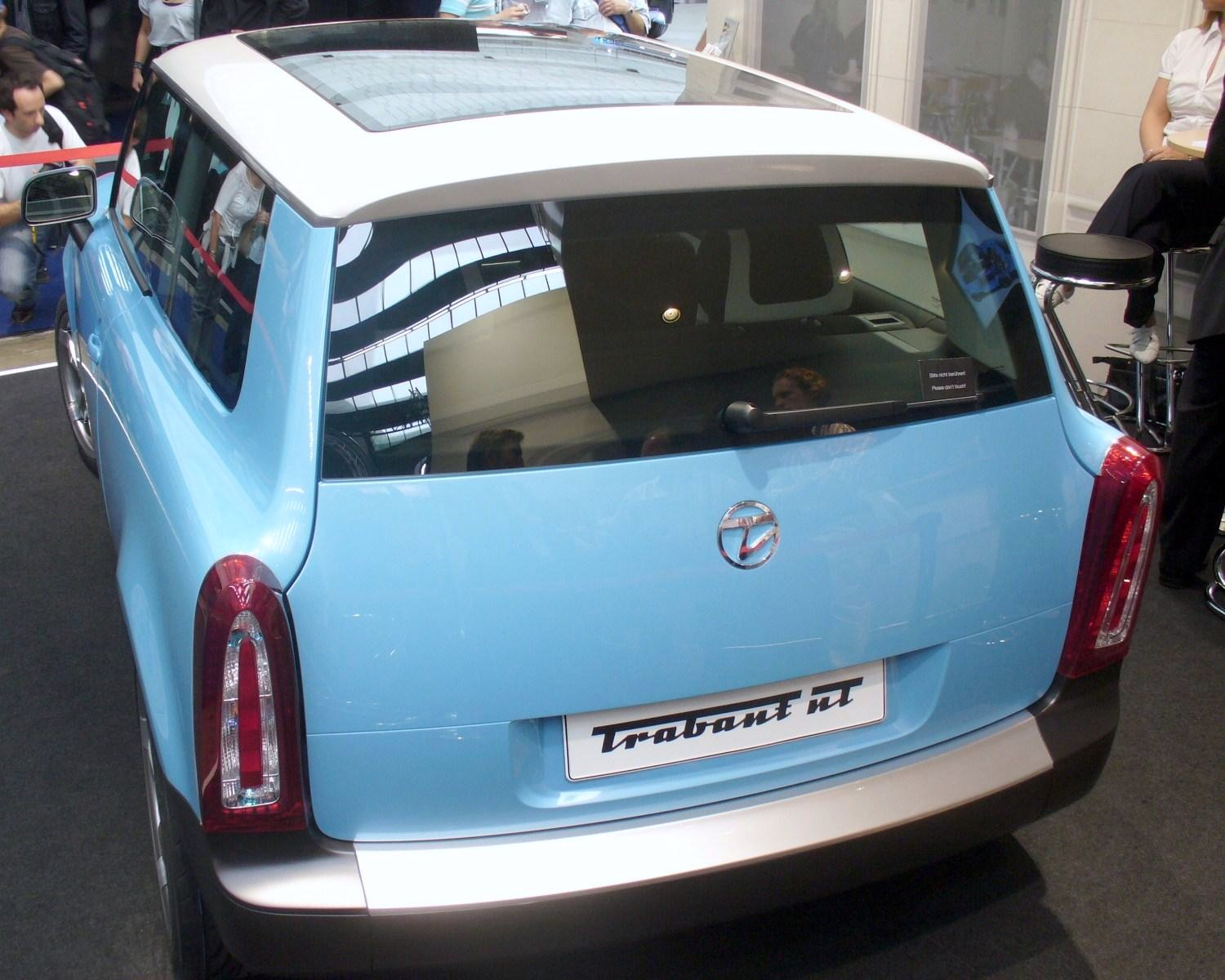 Trabant nT